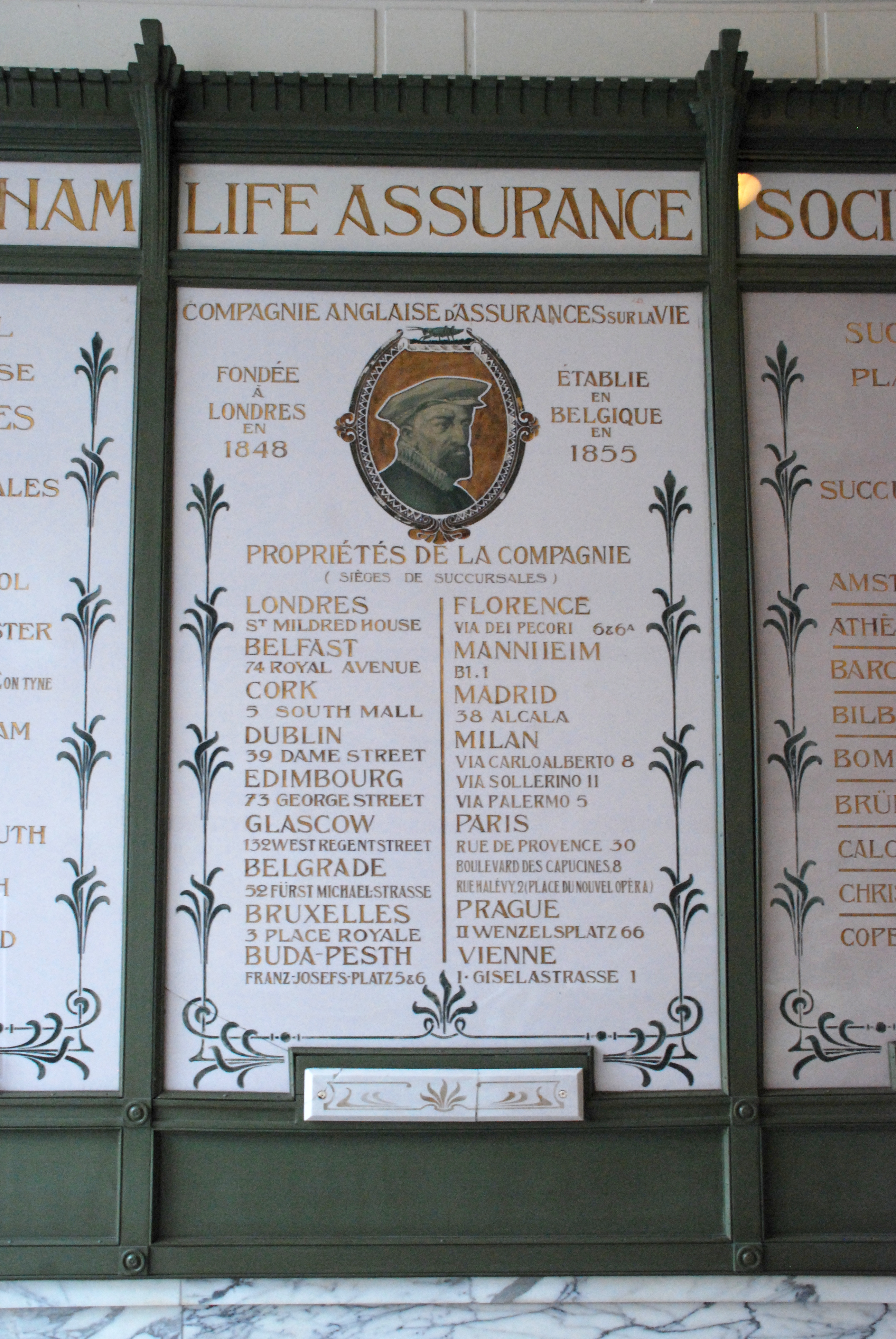 Belgique - Bruxelles - Hôtel Gresham (Art nouveau)